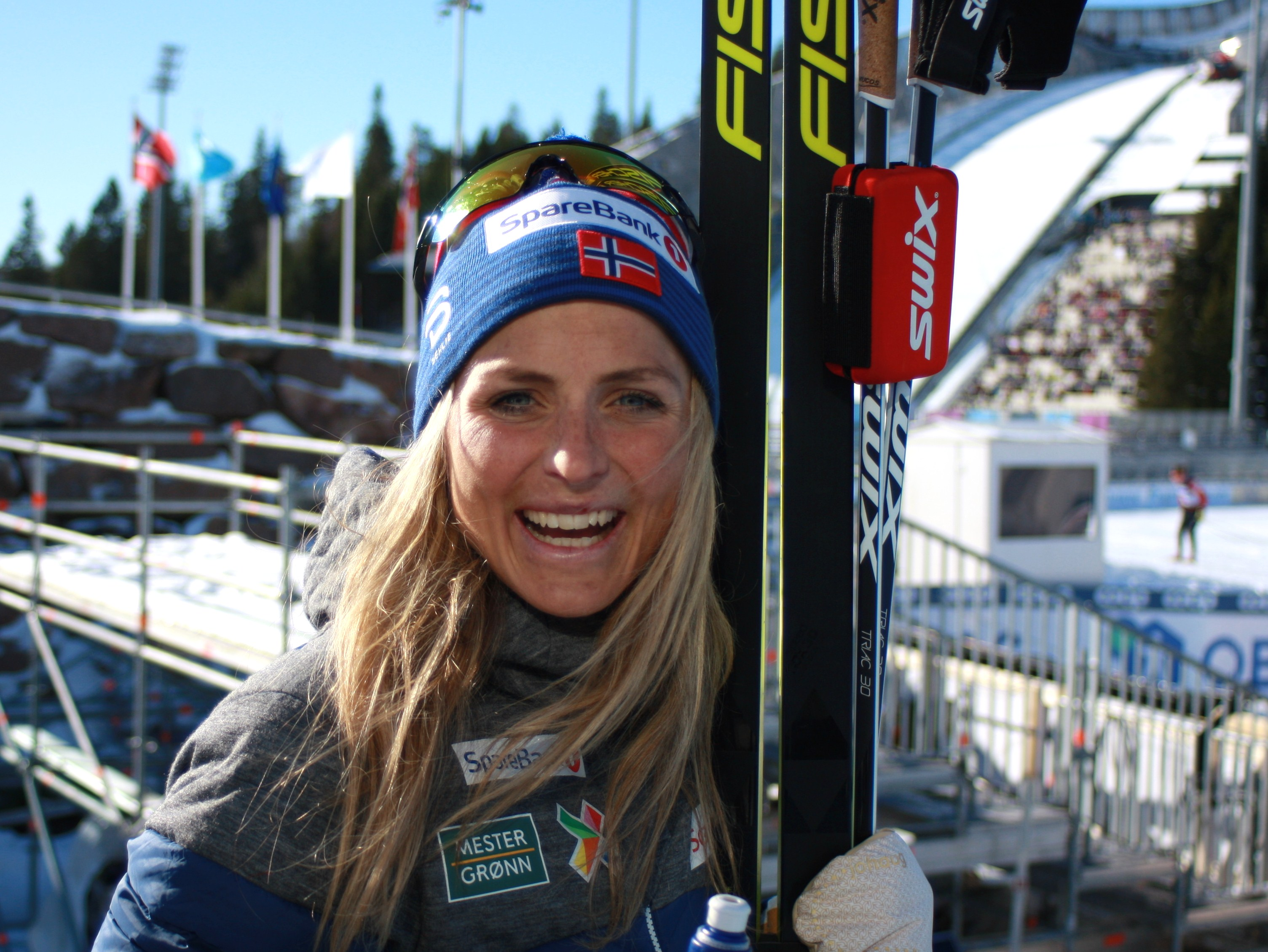 Therese Johaug, Holmenkollen, Oslo, 10.03.2019